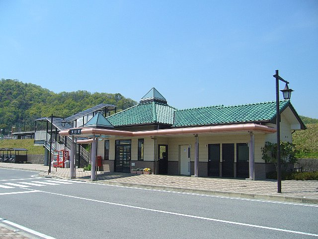 井原鉄道 小田駅 駅舎